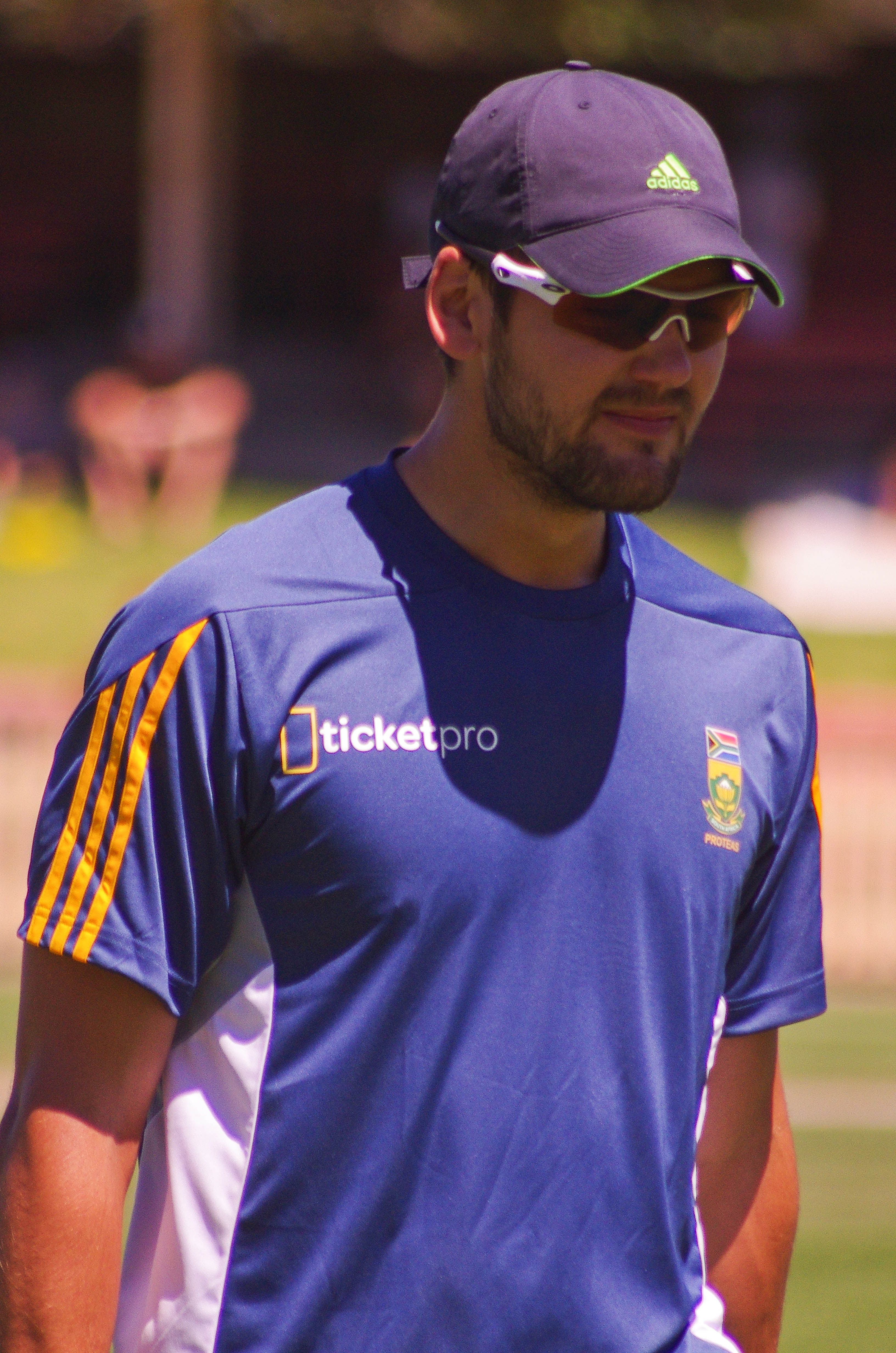 RILEE ROSSOUW